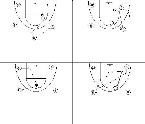 Fases de la jugada corte UCLA